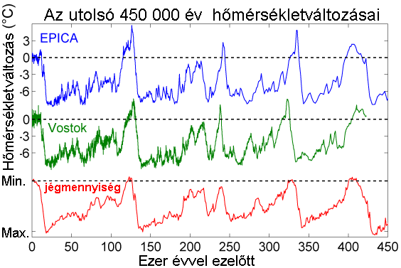 Az utolsó 450 000 év hőmérséklet-változásai